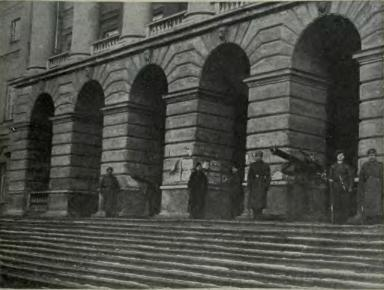 El Instituto Smolny de Petrogrado custodiado por Guardias Rojos, 1917-1918